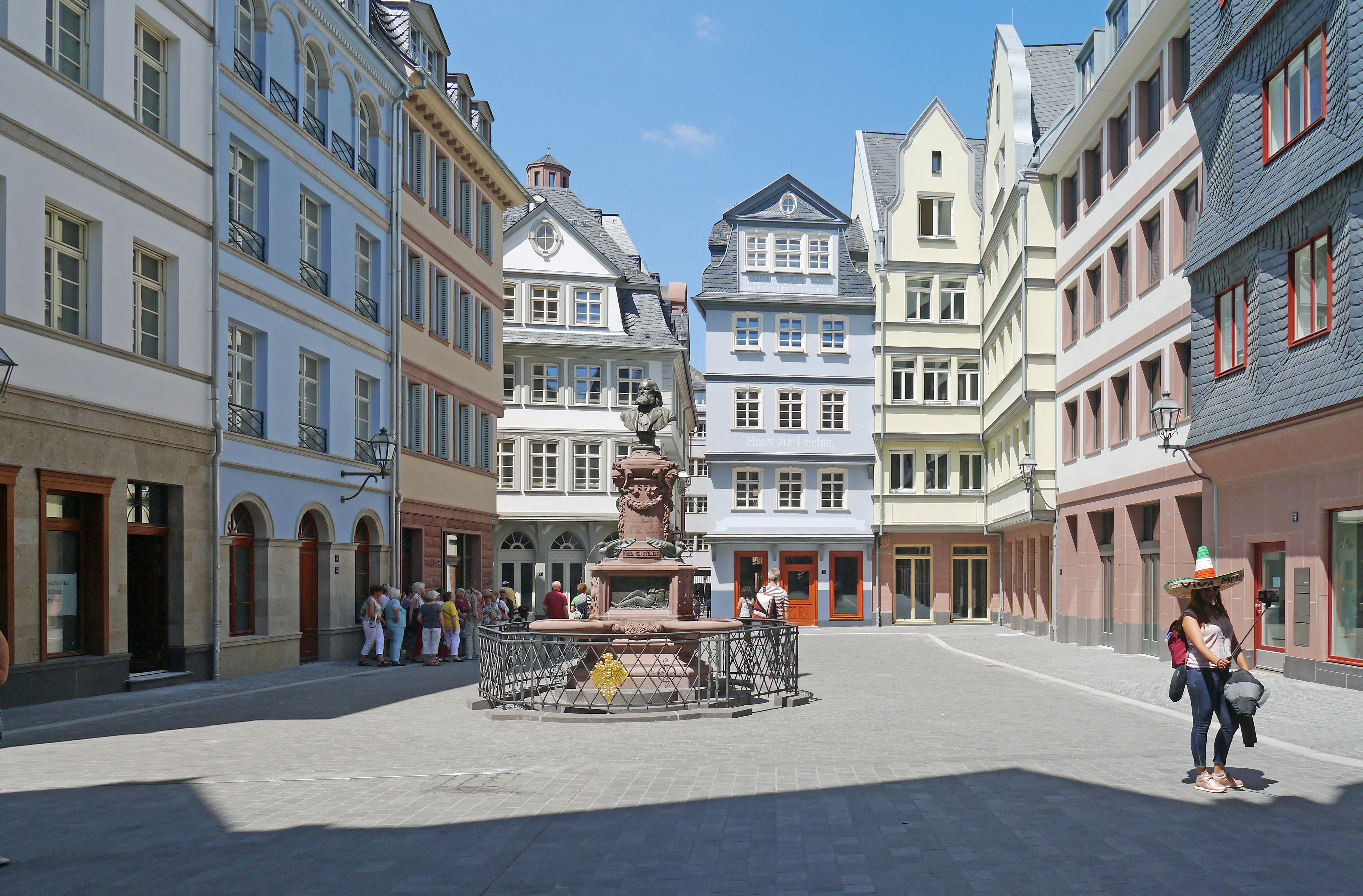 Blick vom Markt auf den Hühnermarkt mit dem Stoltze-Brunnen (20.06.2018). Hinten links: das Haus Esslinger, dann die Neugasse und rechts davon das Haus Zur Flechte.